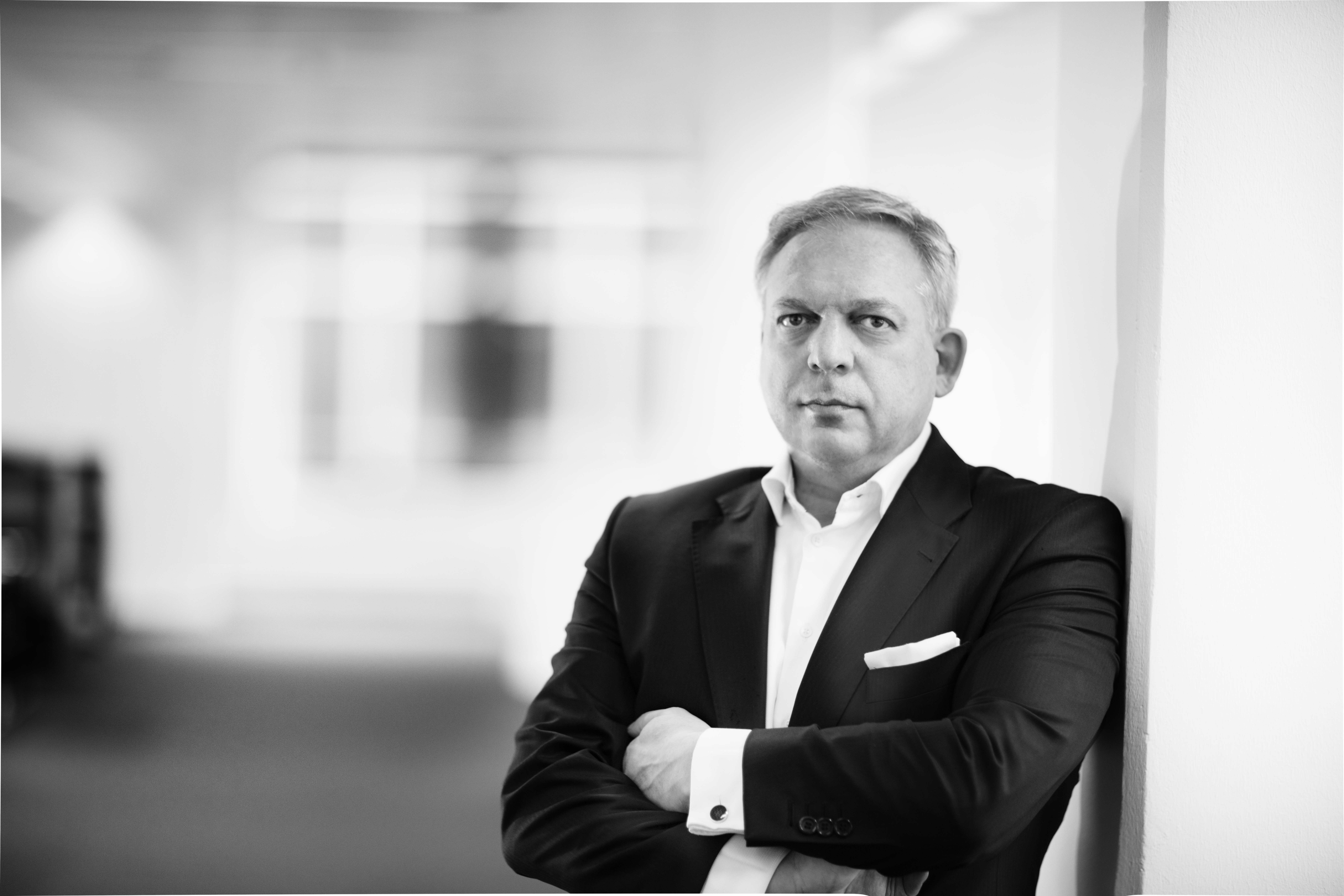 Porträt Magnus Kaminiarz